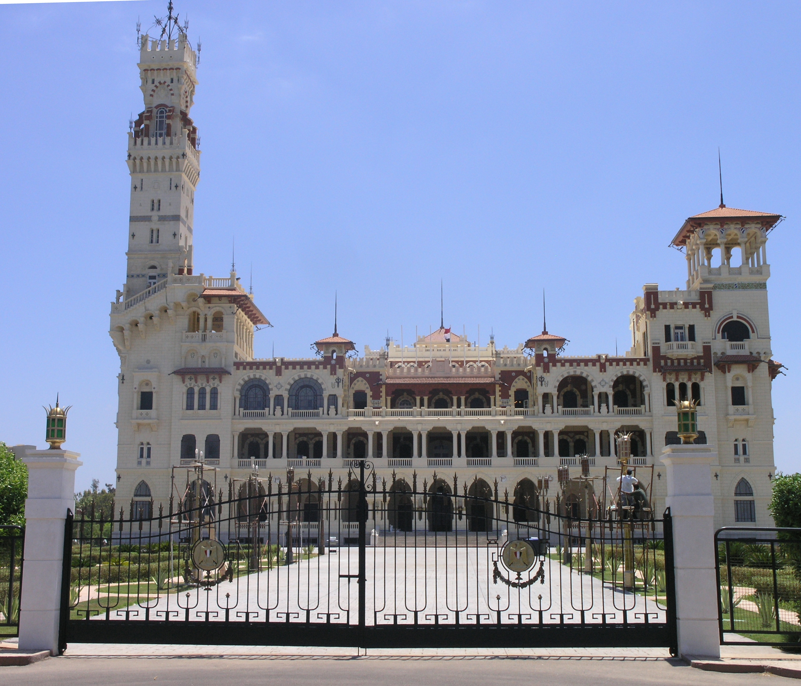 Alexandria - Montaza Palace - front view